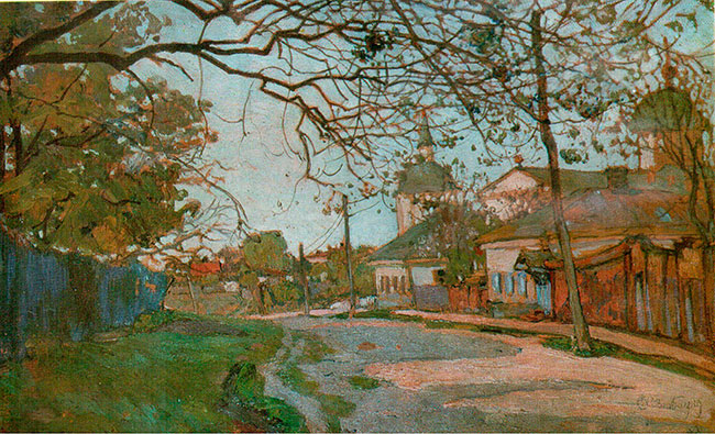 Картина «Вулиця в Полтаві»